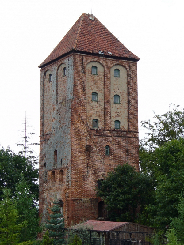 Zamek krzyżacki, Przezmark, Polska Data wykonania zdjęcia: 18.08.2006 r. Autor zdjęcia: Maciej McLion Lewicki, Bydgoszcz, Polska